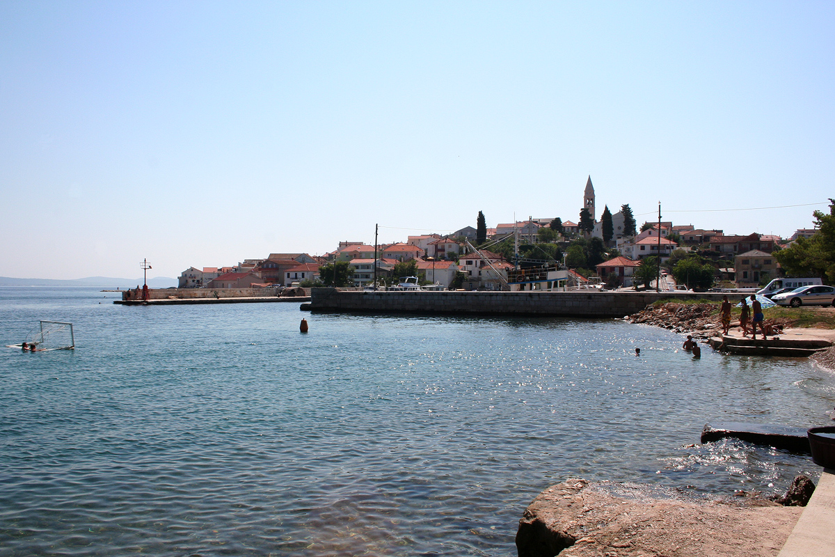 Kali (Dalmacia)